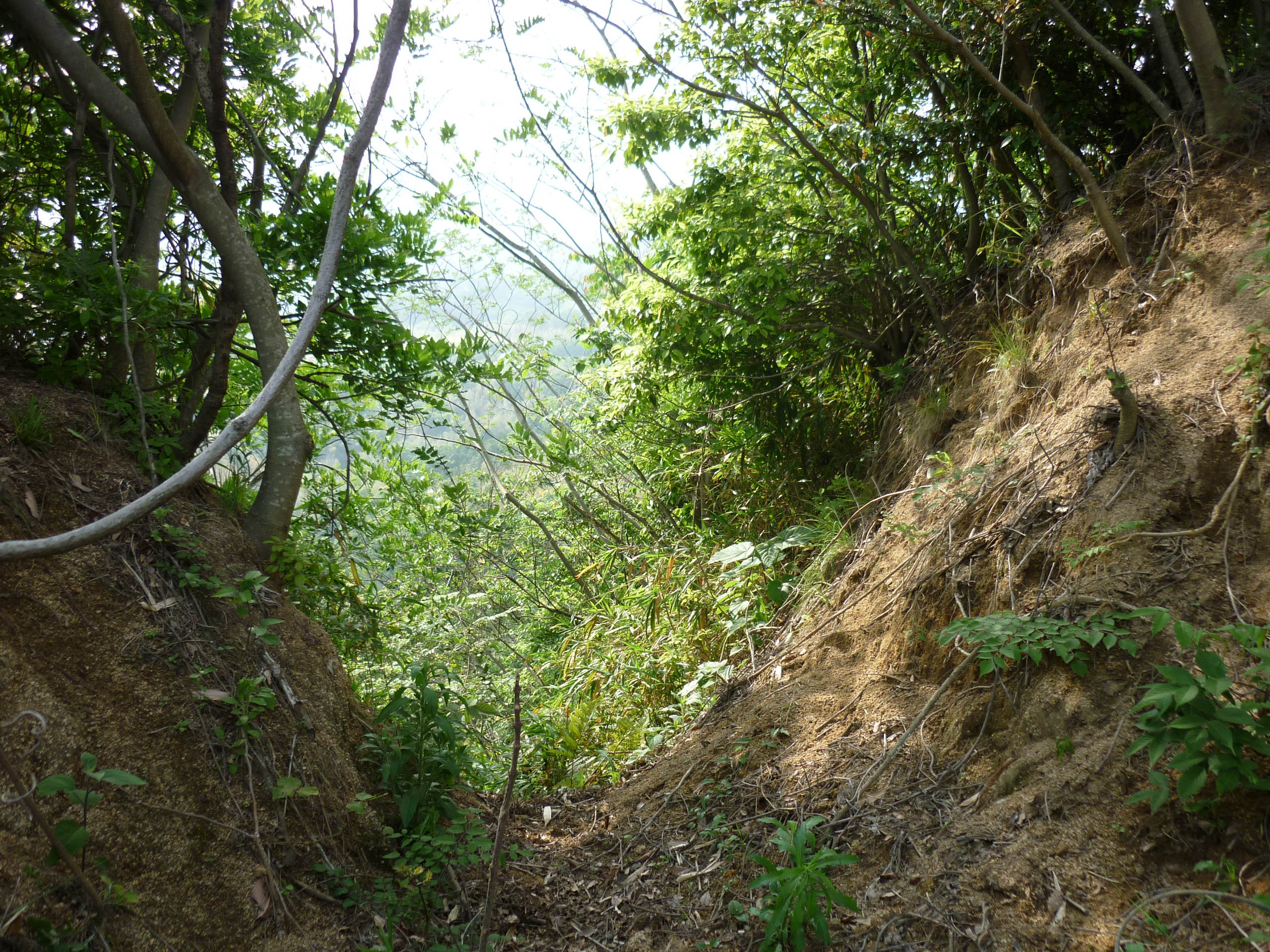 堀切跡